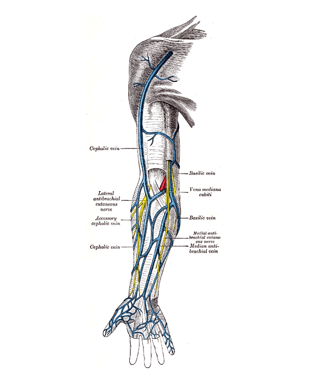 Abbildung der Armvenen